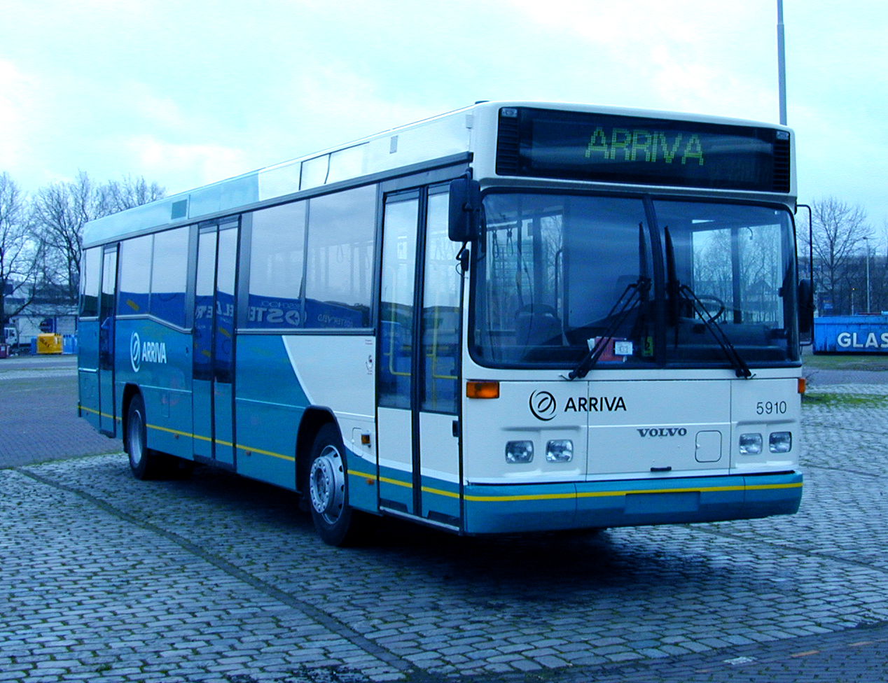 Arriva bus 5910, ex Ödåkra Buss AB, Helsingborg bus 6413 als Länstrafiken Malmöhus van het type Volvo B10BLE - Carrus City L te Groningen. Deze bus is sinds juli 2010 als Arriva Portugal.